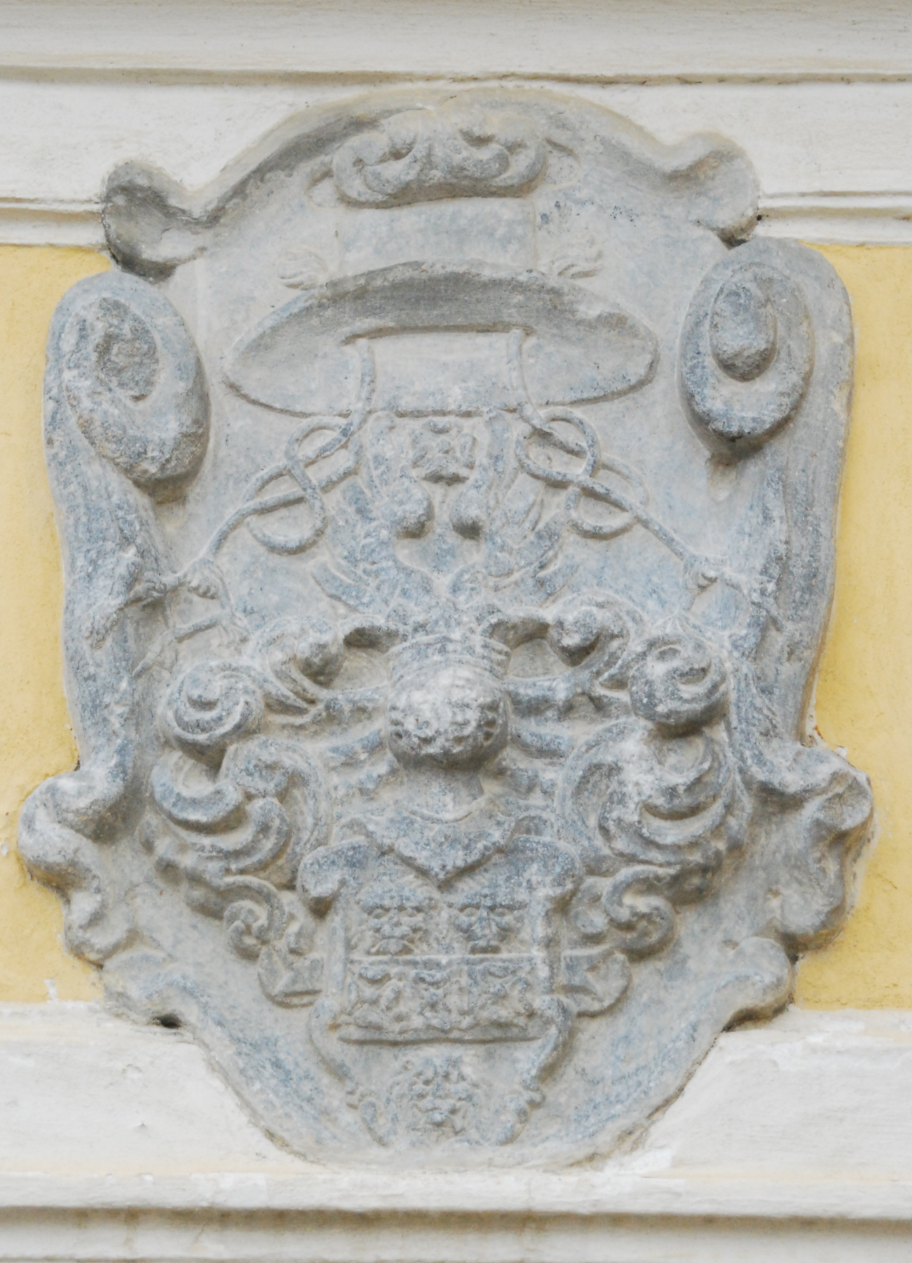 Die Propstei in Hradiste (Znojmo) auf dem Pöltenberg. Wappen von Propst Thomas Cornelius Sclessin (1653 - 1675) oberhalb des Eingangs. Für Wappen der Familie Sclessin